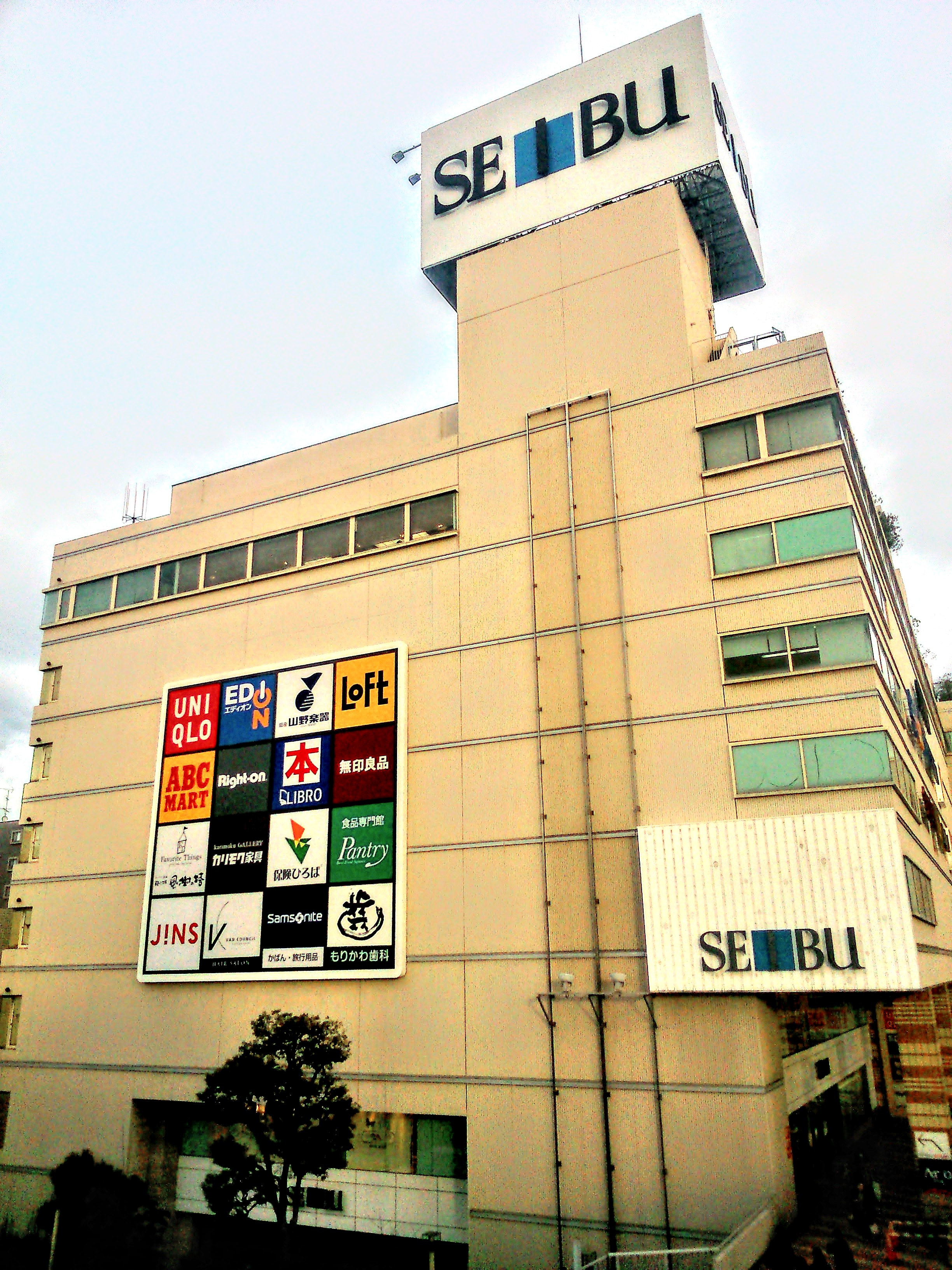 西武八尾店を近鉄八尾駅のホーム上から撮影しました。